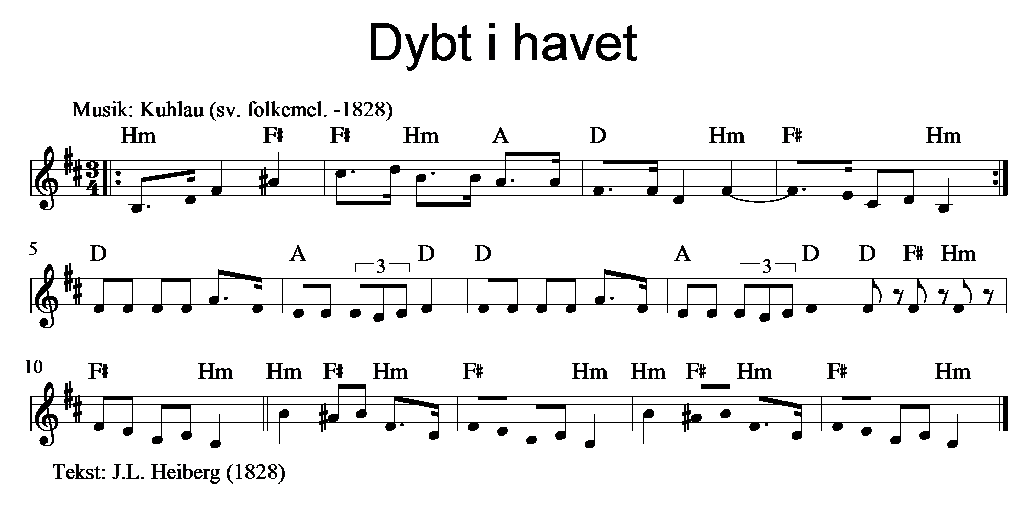 Dybt i havet - en sang fra skuespillet "Elverhøj".